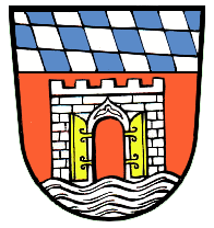 Wappen der Stadt Deggendorf